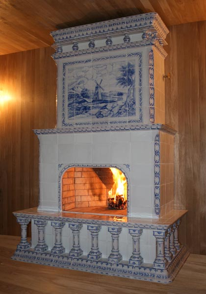 Камин изразцовый